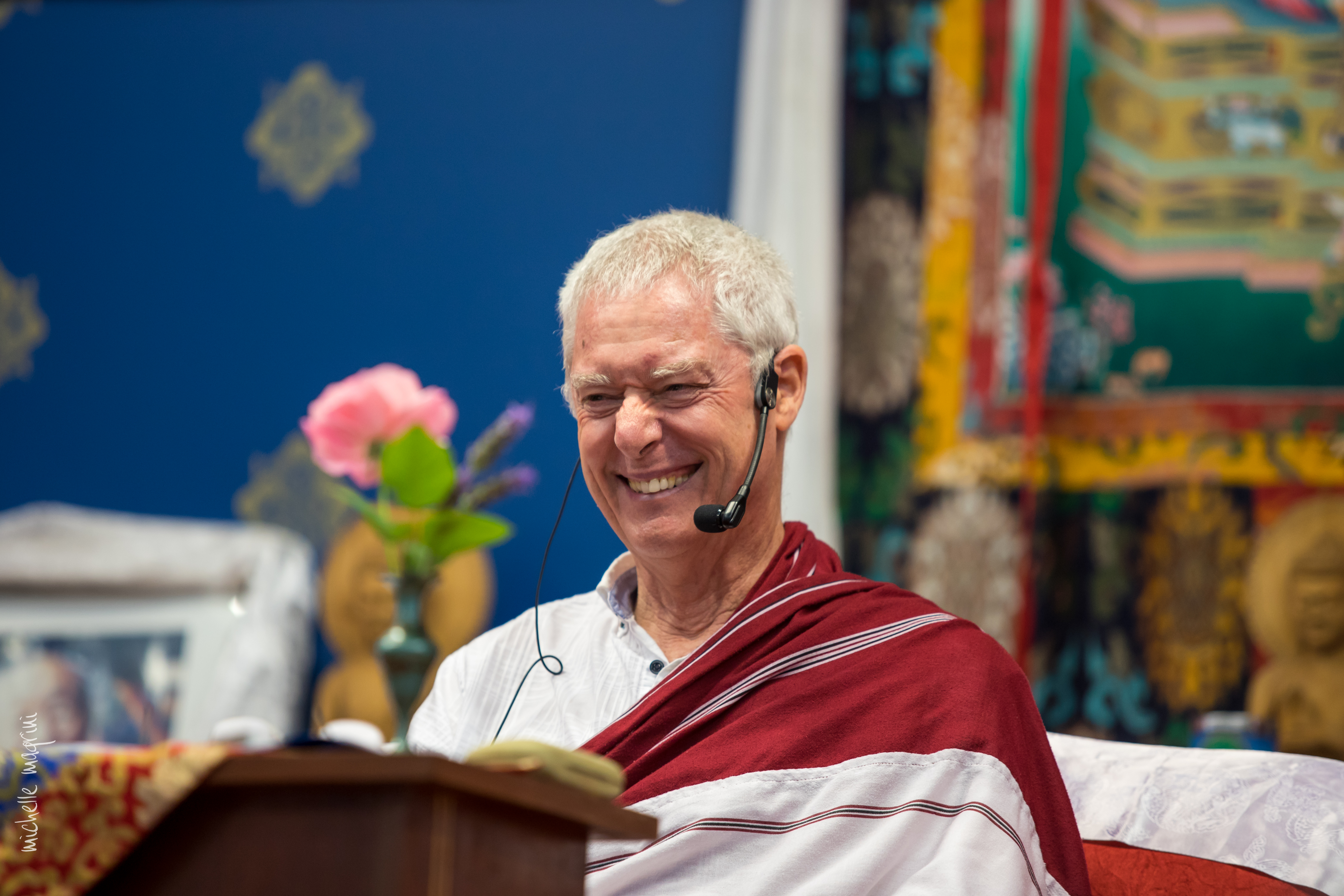 B. Alan Wallace, no retiro que conduziu no Brasil em 2018